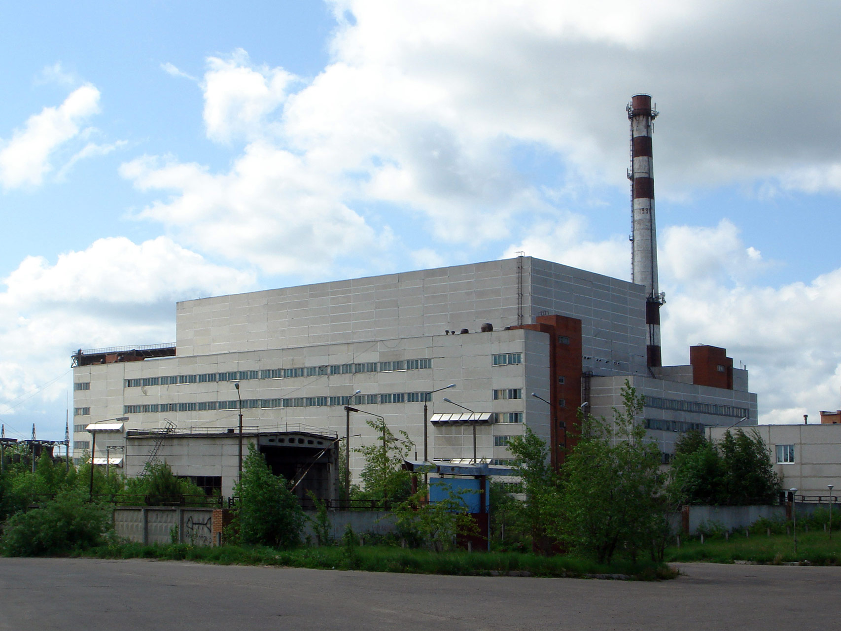 Вид на ГАСТ с северной стороны.